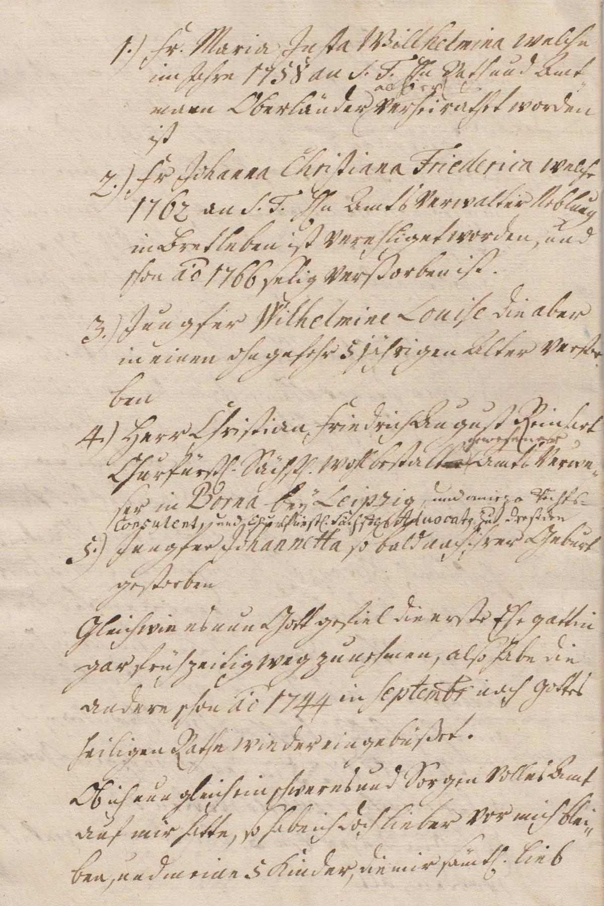 Seite 14 der Leichenpredigt für den Pastor August Wilhelm Reinhart (1696/1770), Bürger der Stadt Heringen an der Helme.